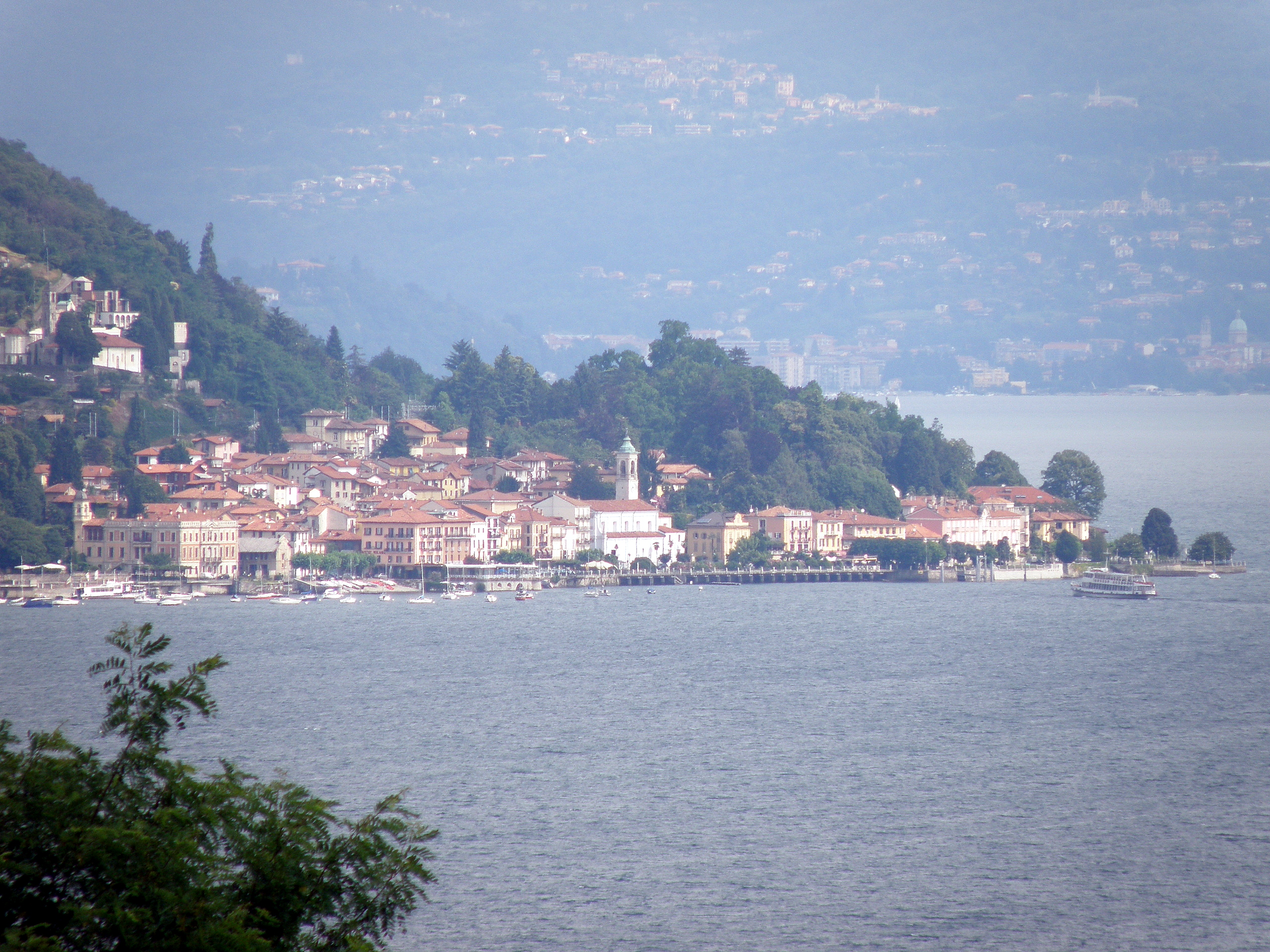 Belgirate (VB). Panorama da Ranco.